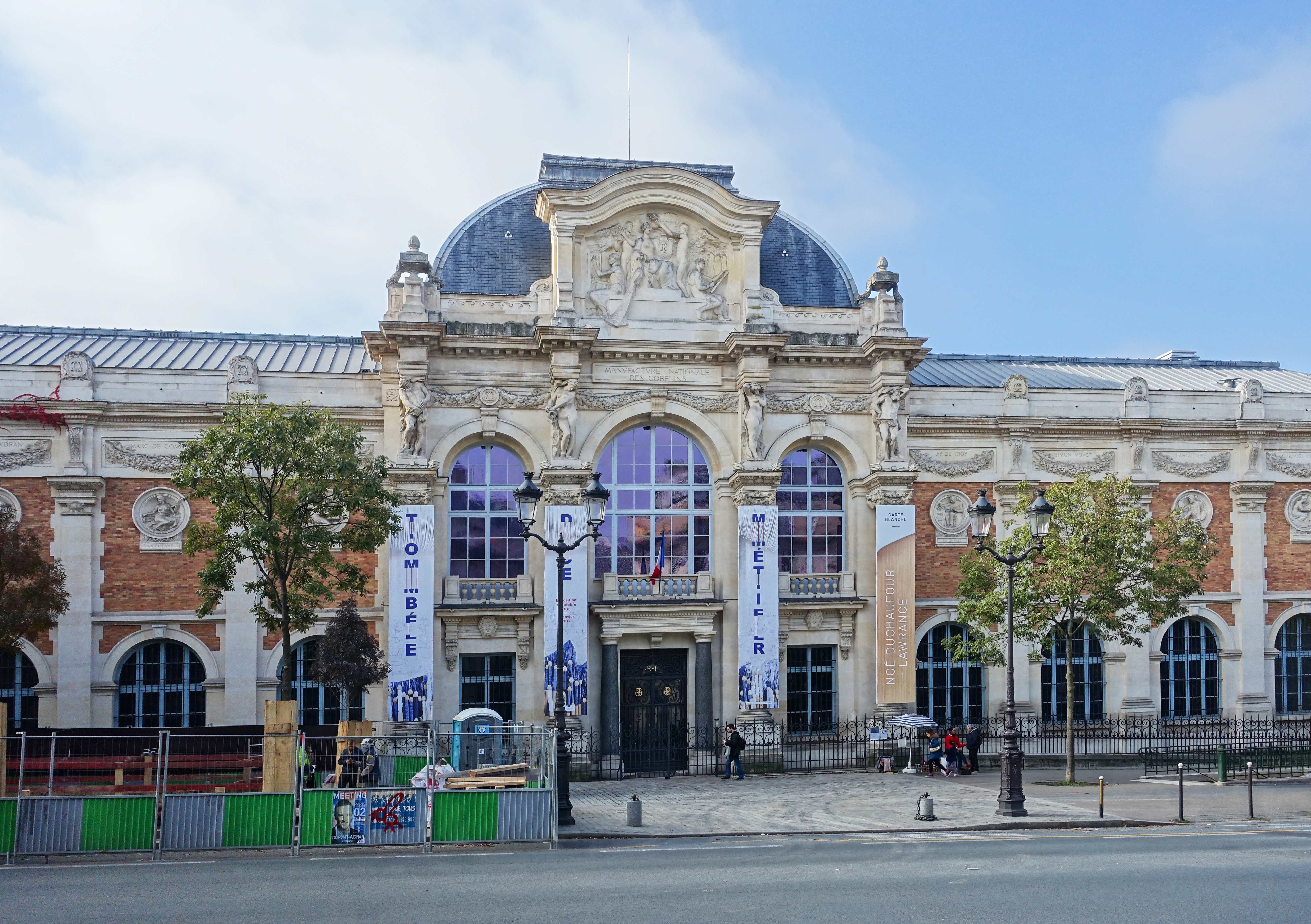 Manufacture des Gobelins @ Paris